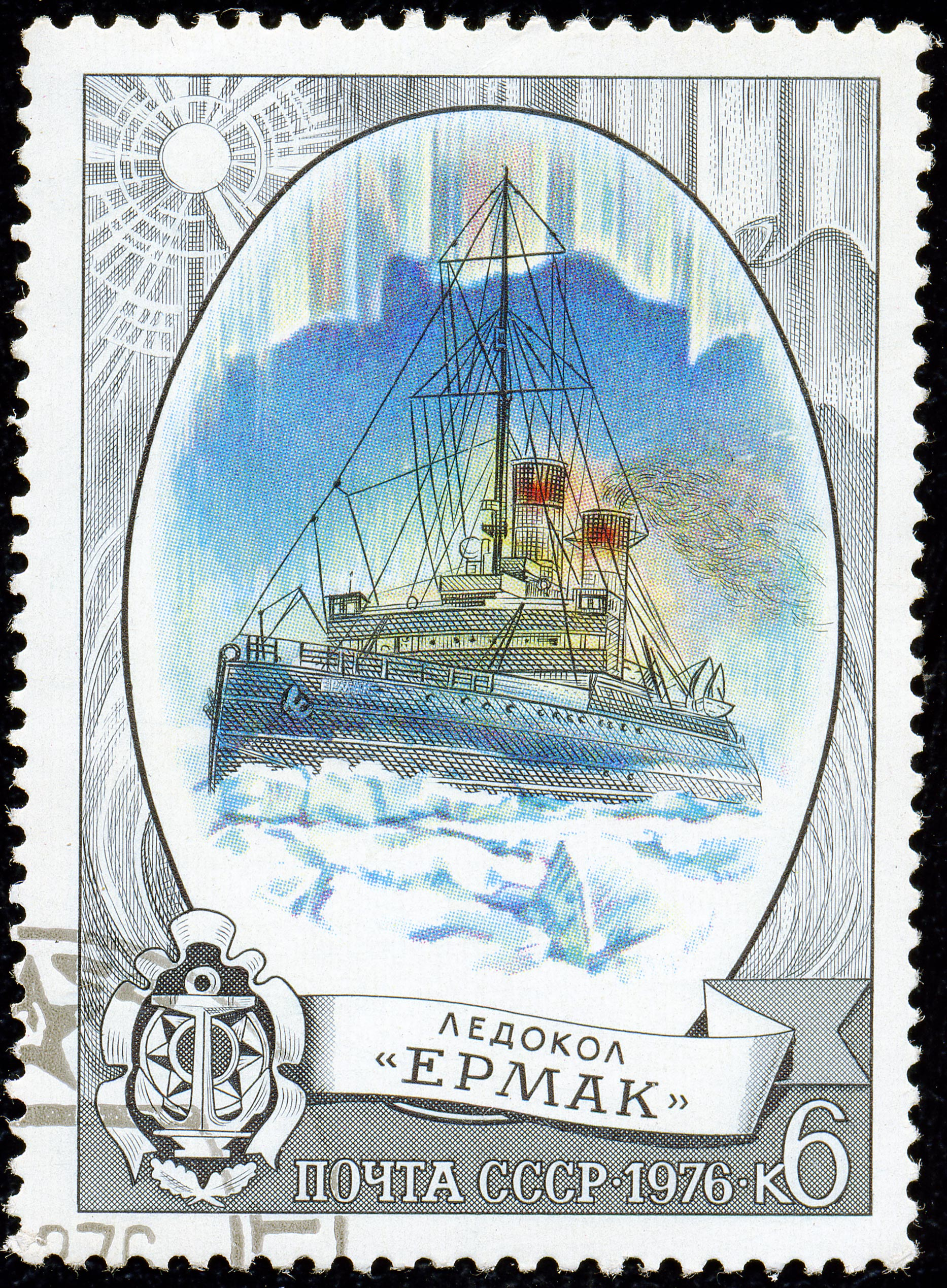 La poŝtmarko. 1976. Glacirompilo «Jermak».